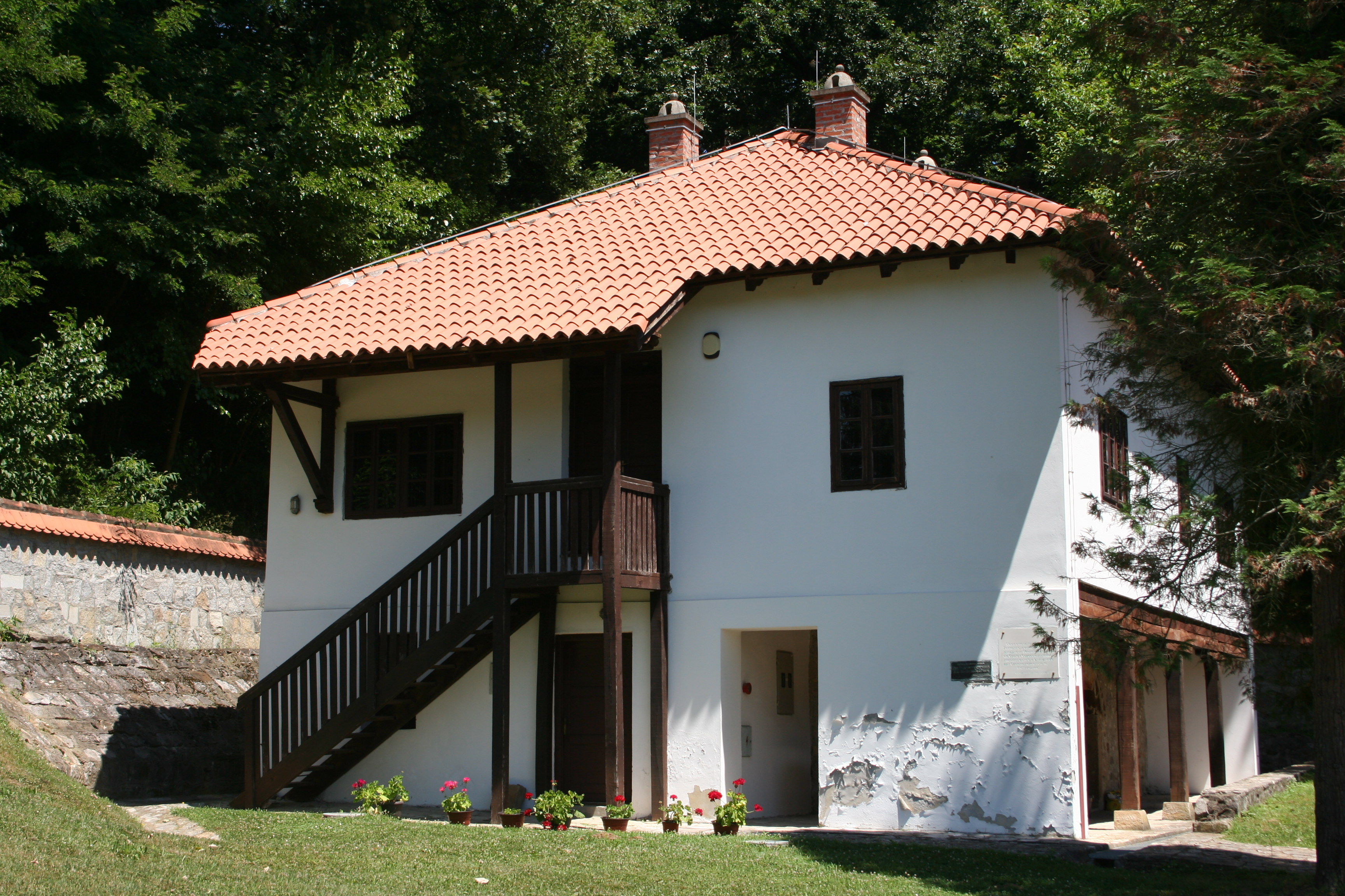 Manastir Bogovađa